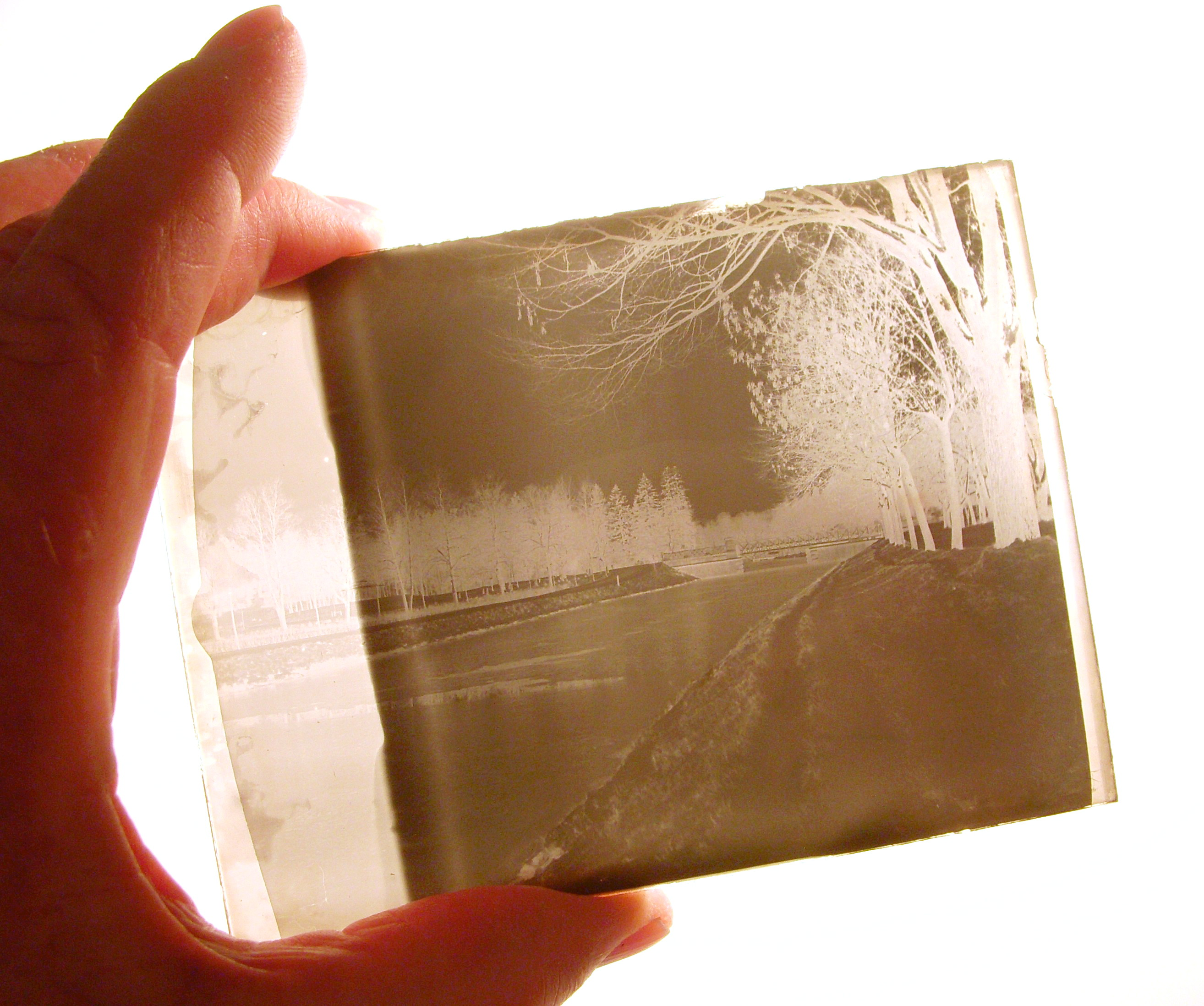 Fotografisk glasplåt visande Djurgårdsbrunnskanalen i Stockholm 1905